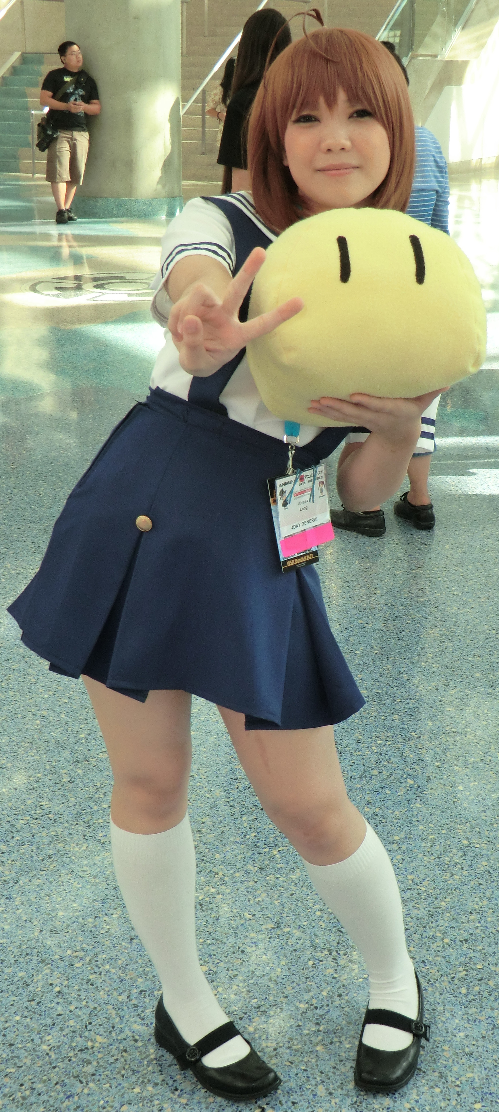 Cosplayer raffigurante Nagisa Furukawa, protagonista della visual novel Clannad.